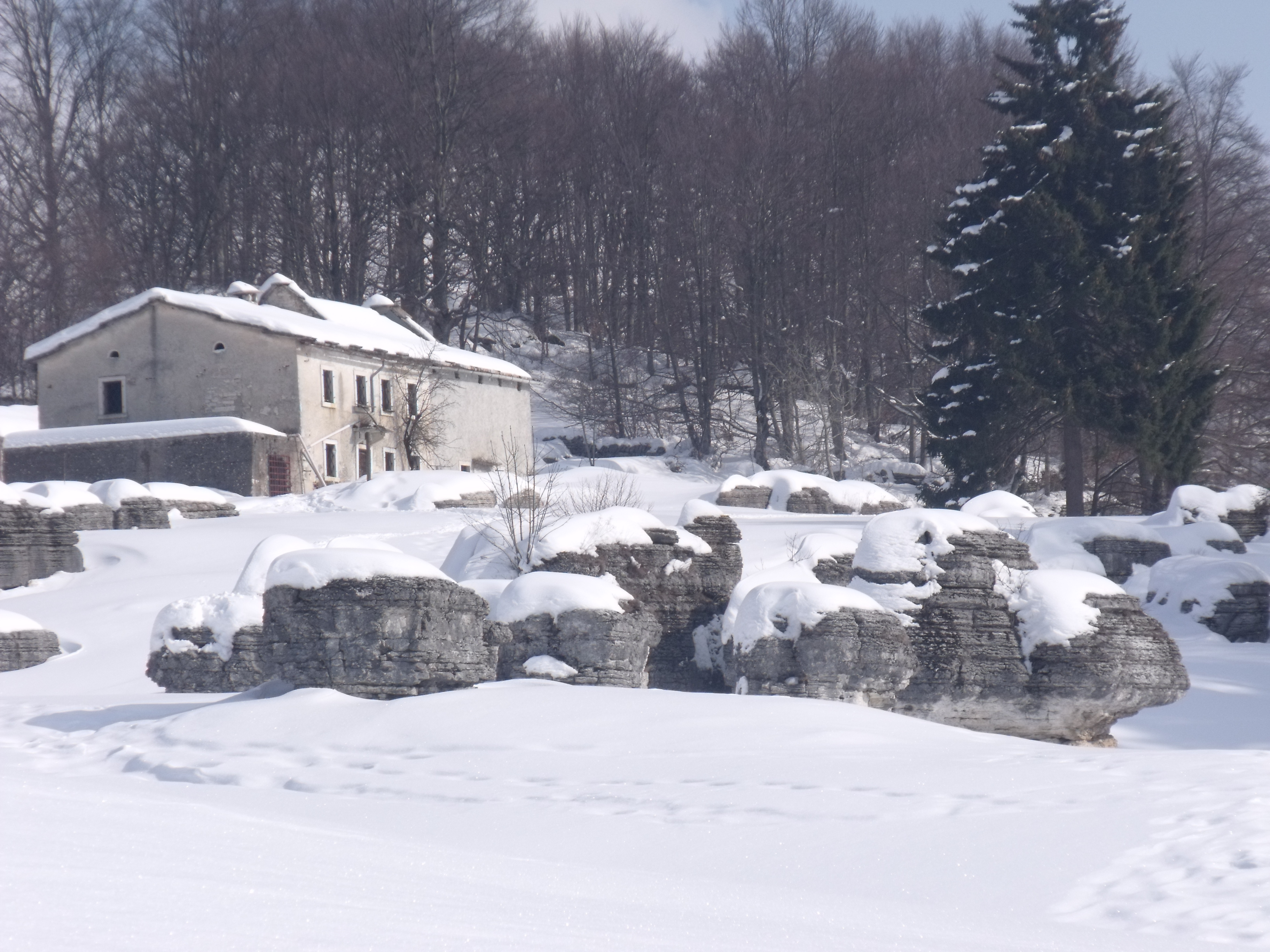 Valle delle sfingi durante la stagione invernale